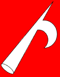 Csáklyafej_(heraldika,)_fr_--_harpon